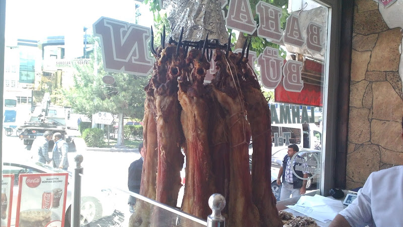 Siirt ilinde Büryan kebap salonunda görüntülenmiş Büryan kebabı.